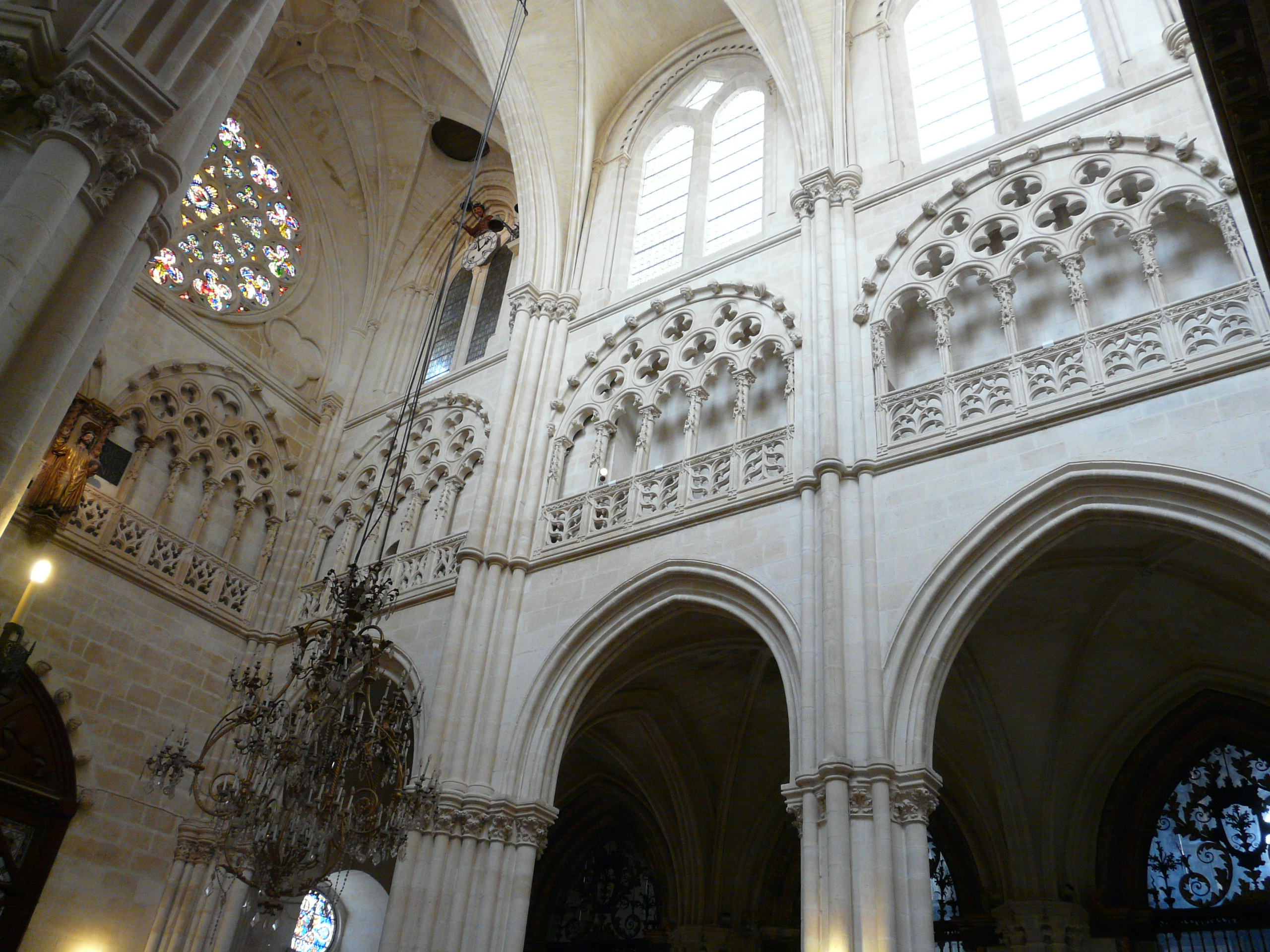 Triforio con decoración de cabezas en la Catedral de Burgos, España.